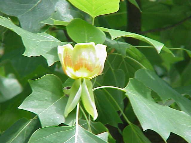 Species: Liriodendron tulipifera Family: Magnoliaceae Image No. 3